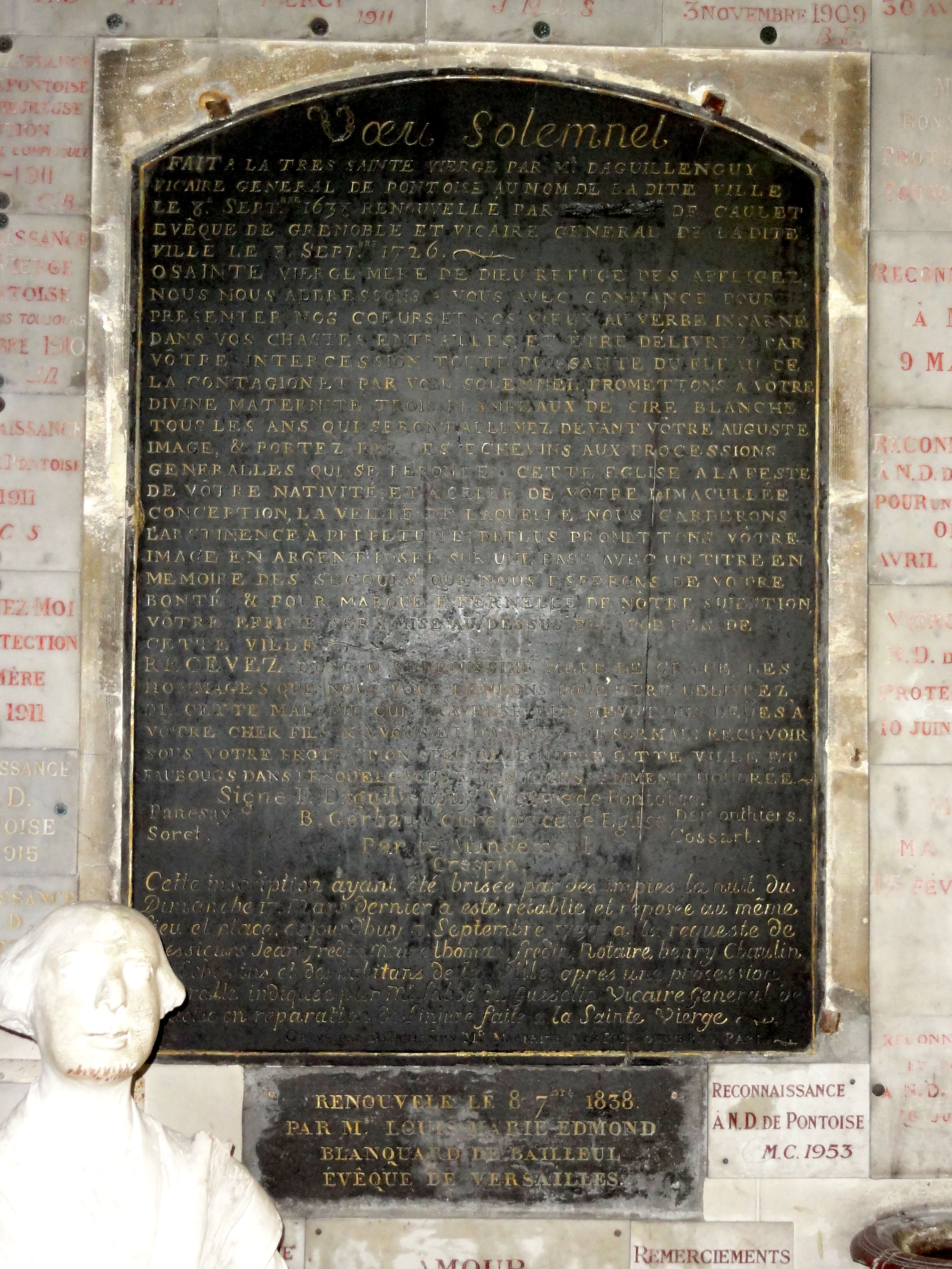 Chapelle de la Vierge, vœu solennel du 28 août 1638.